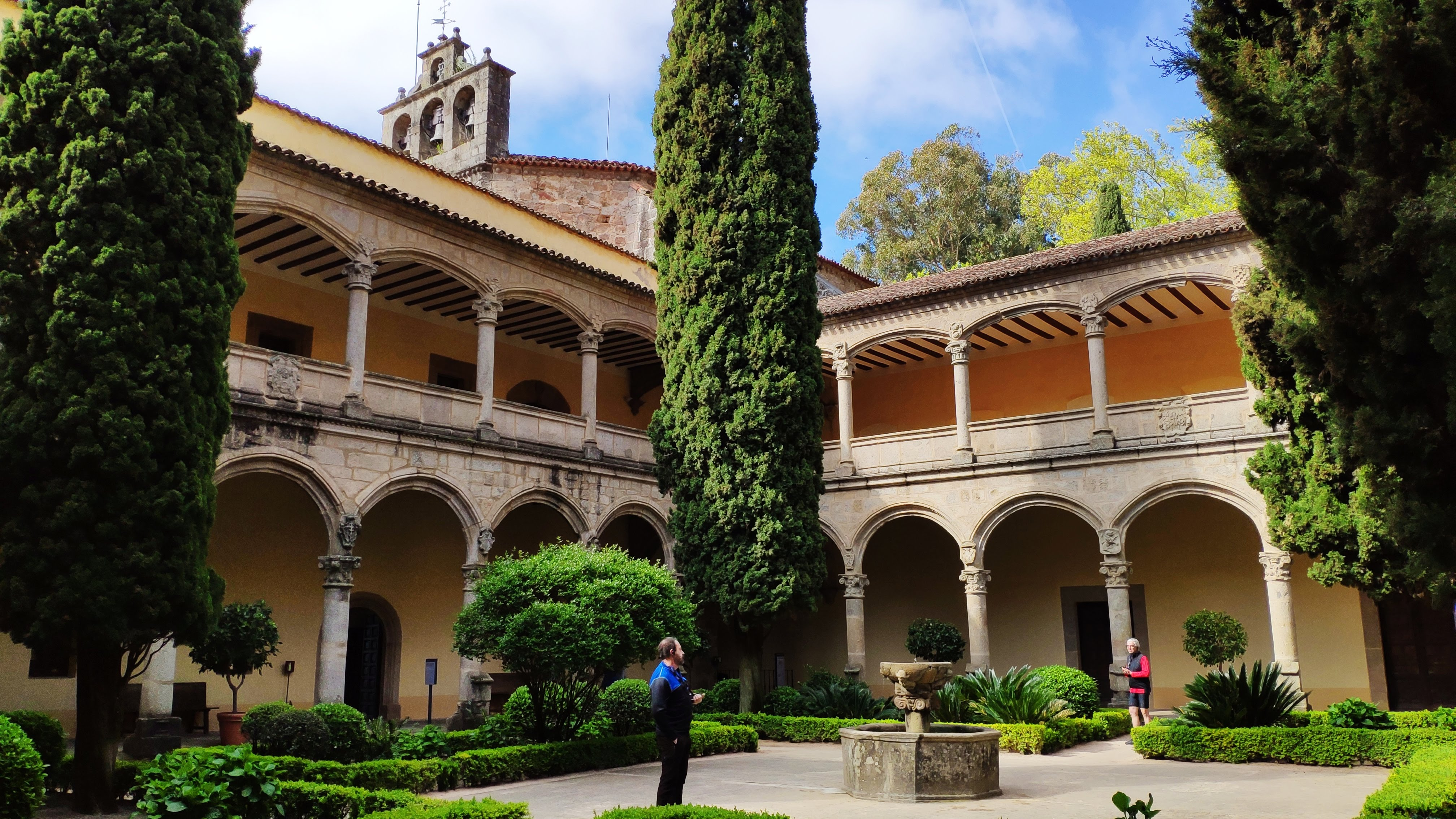 Claustro renacentista del monasterio de Yuste, Cáceres